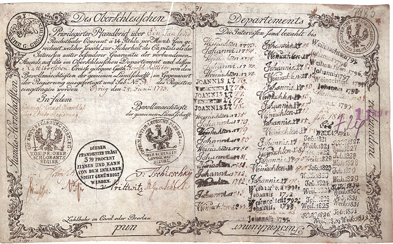 Pfandbrief der Schlesischen Landschaft vom 24. Juni 1773 Veröffentlicht durch den Auktionator Vladimir Gutowski, Wolffenbüttel